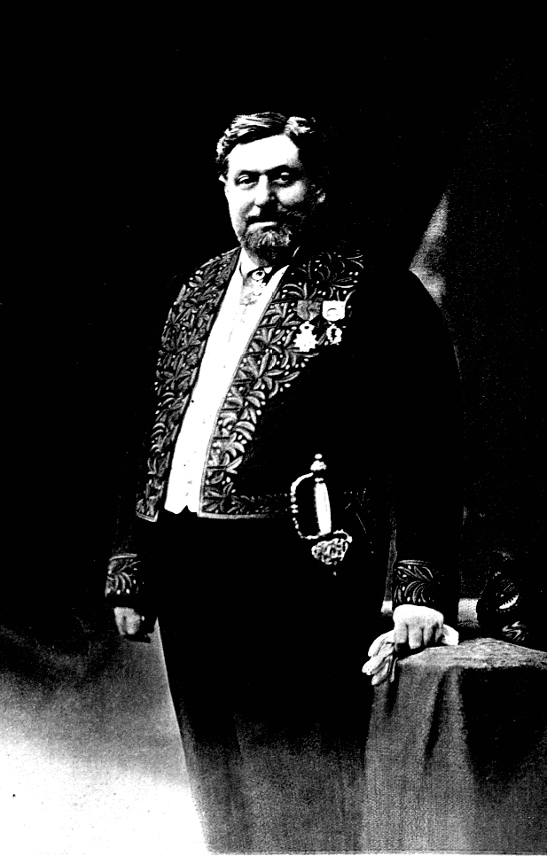 Portrait du comte Paul Durrieu en costume d'académicien, de l'Académie des inscriptions et belles lettres.